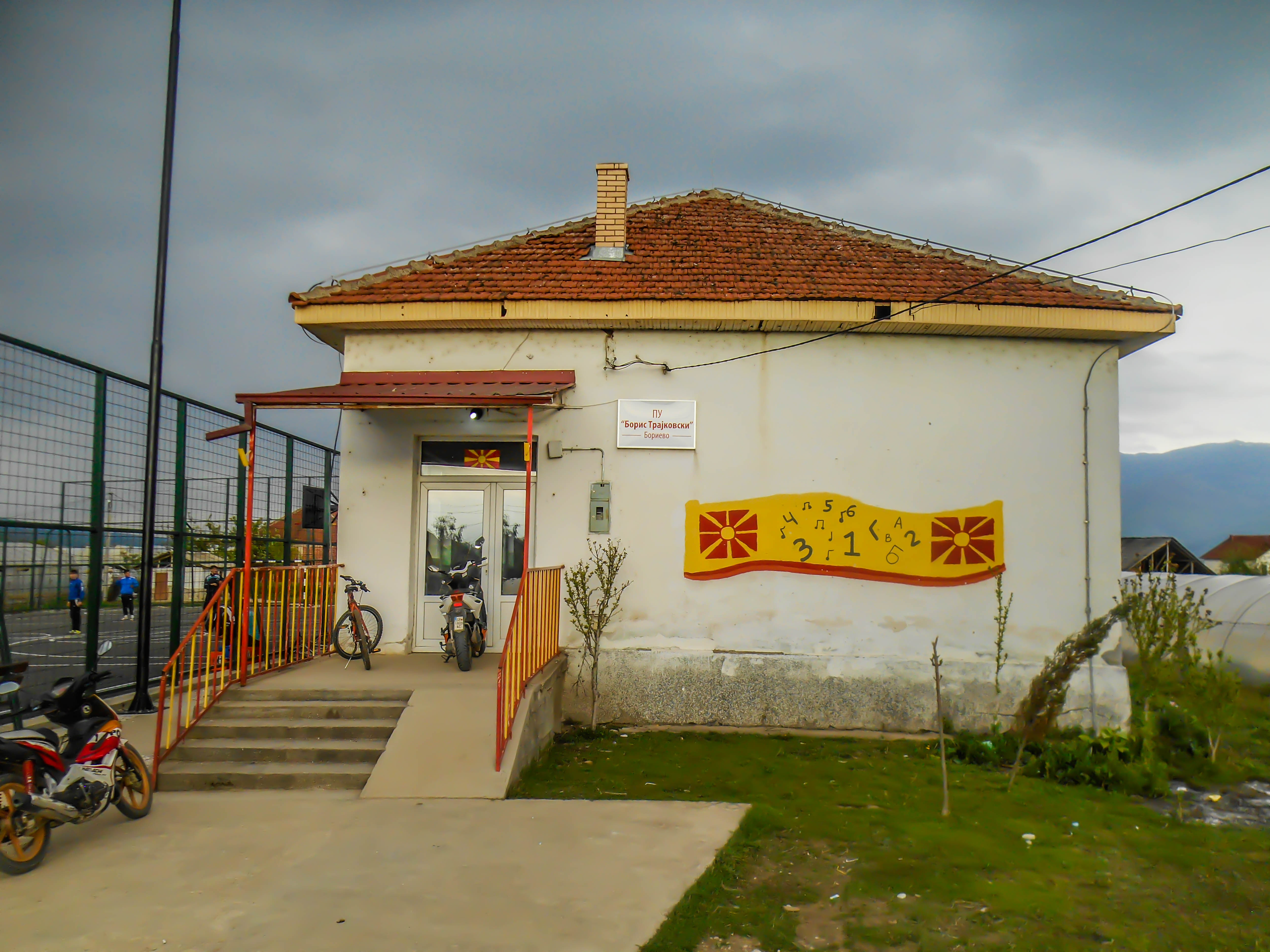 Основно училиште „Борис Трајковски“ - Бориево